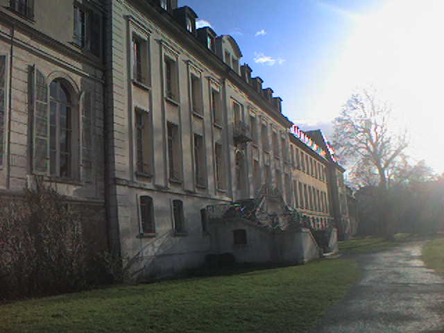 Le château de Morsang-sur-Orge (Essonne, France) vu de côté. Le château abrite une salle de répétition, non visible ici.